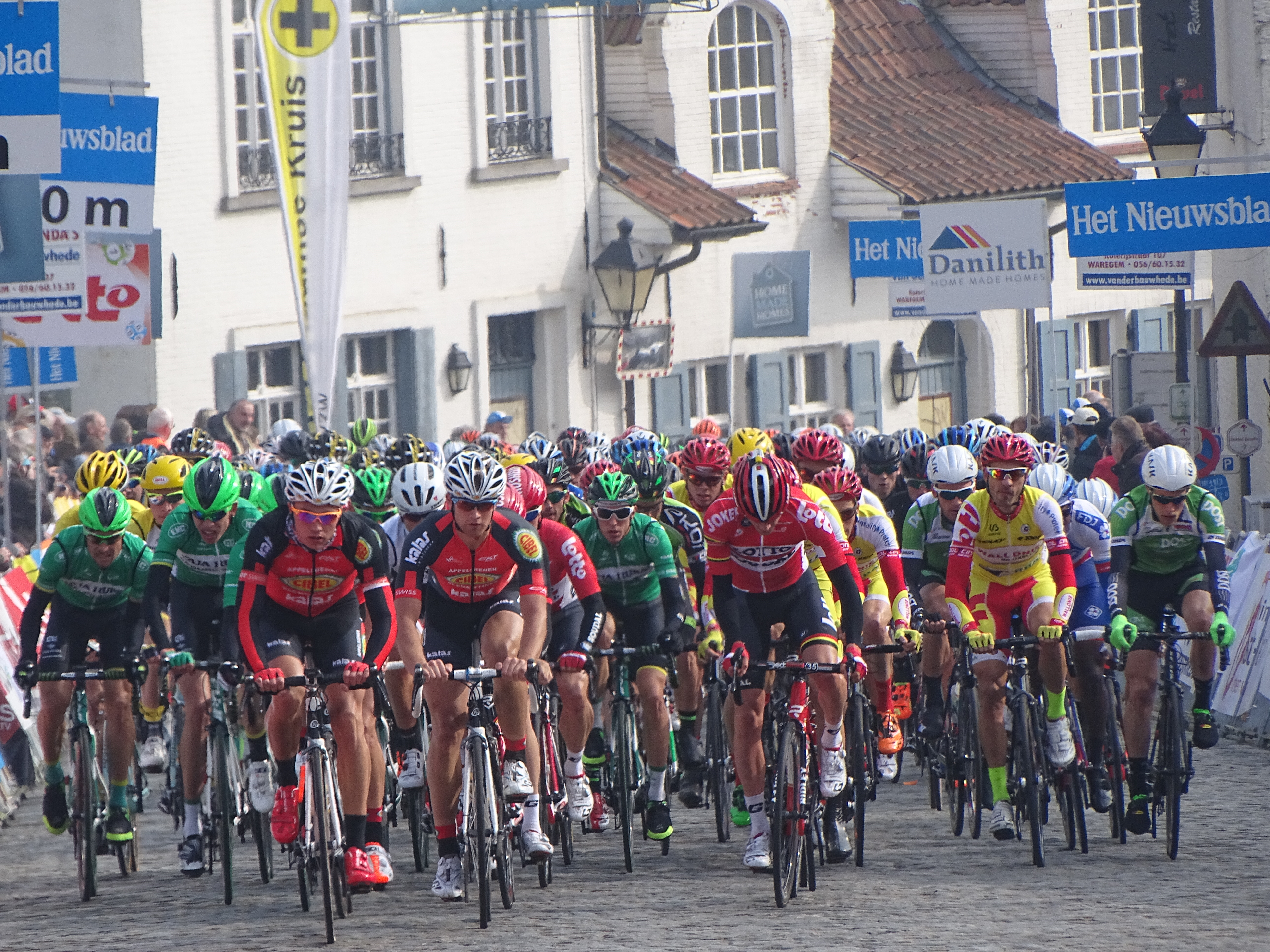 Reportage réalisé le mercredi 18 mars à l'occasion de l'arrivée de la Nokere Koerse 2015 à Nokere (Kruishoutem), Belgique.